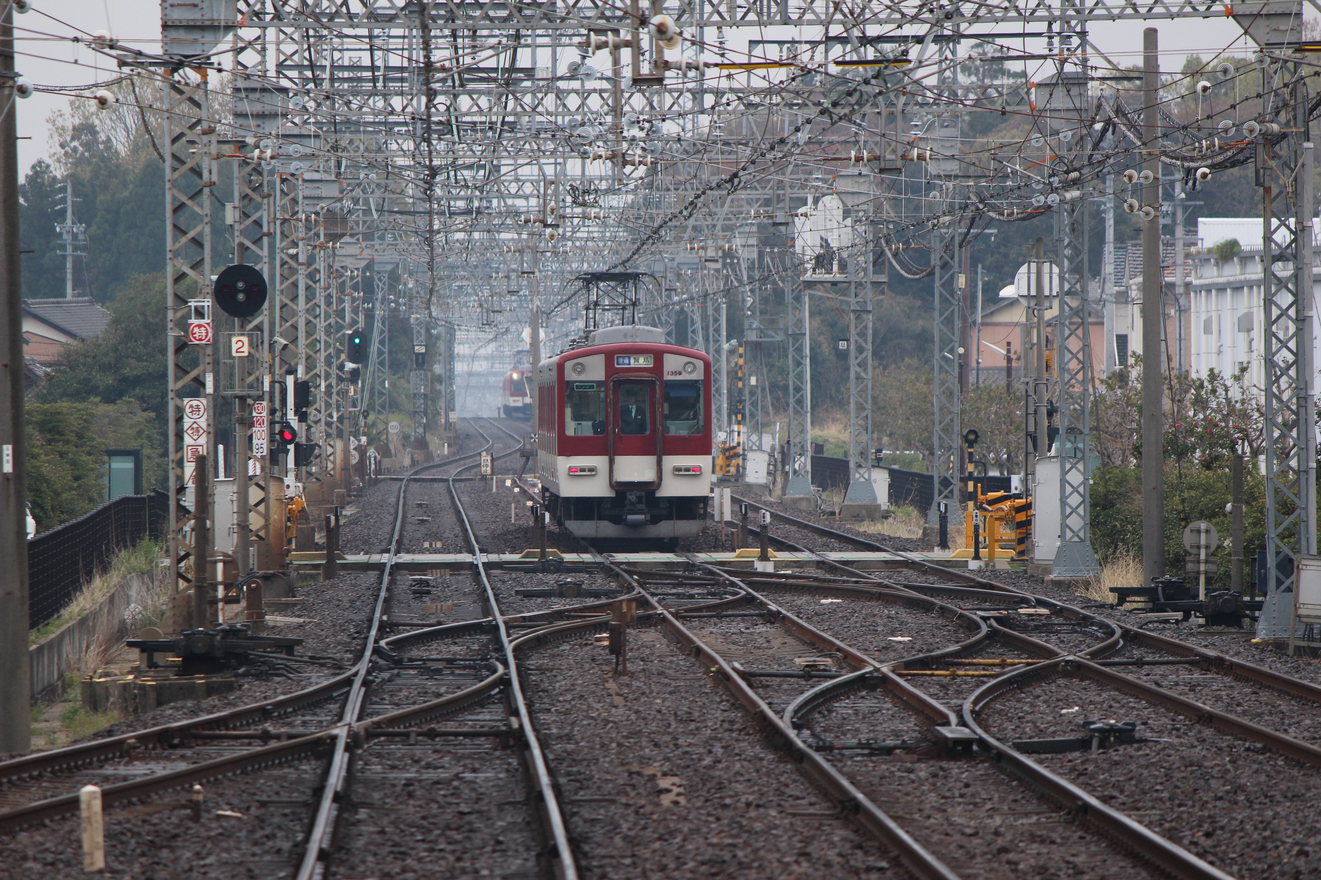 伊勢中川駅構内配線 伊勢方面